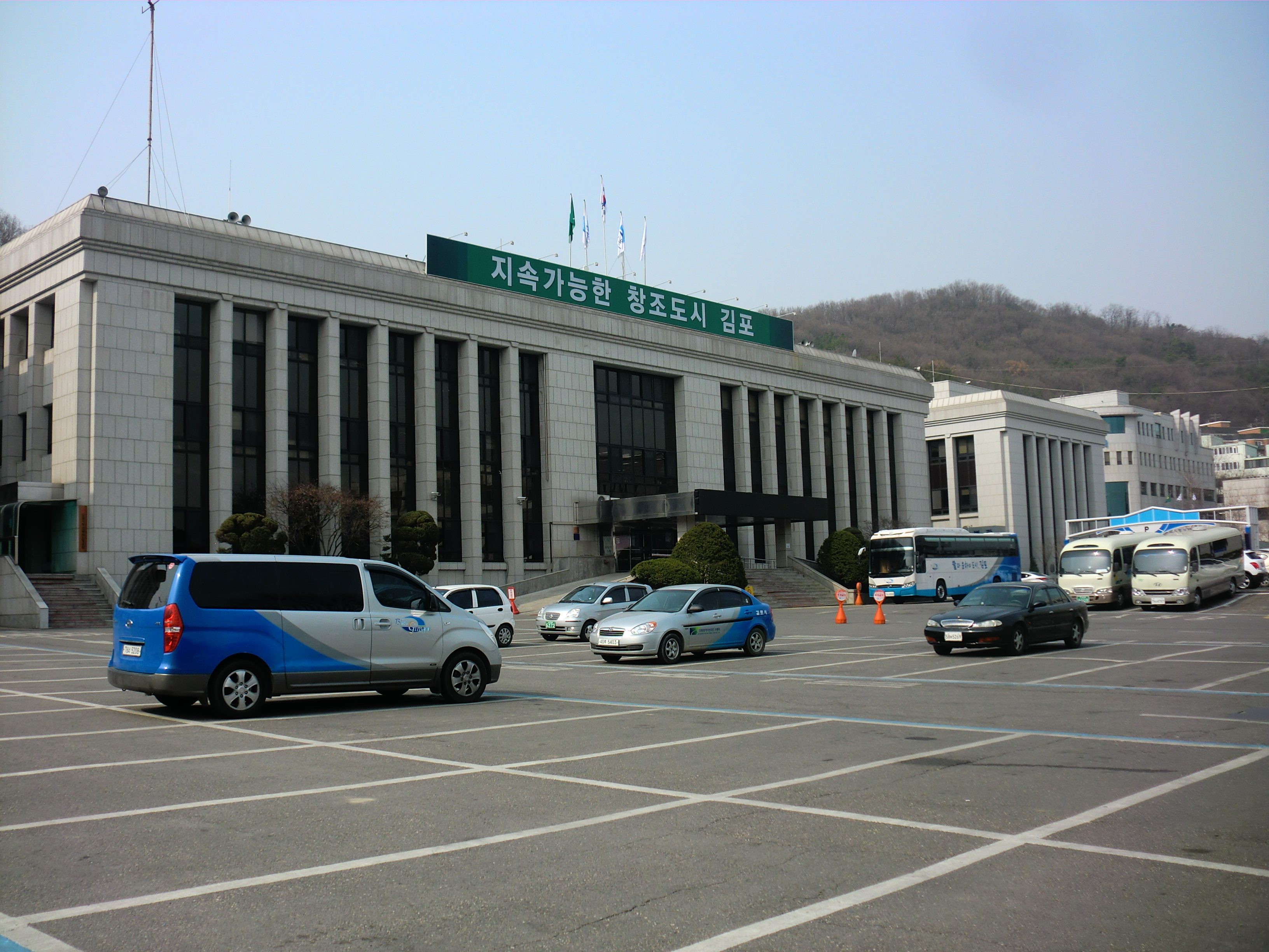 경기도 김포시에 있는 김포시청